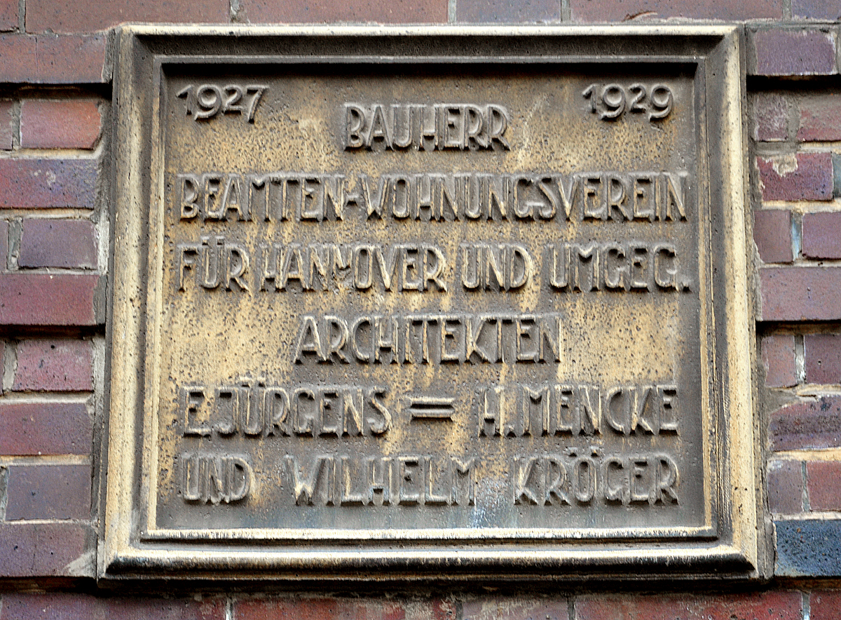 Leicht angeschmutzte Tafel an der Fassade des denkmalgeschützten Klinkergebäudes Waldstraße 8 Ecke De-Haën-Platz in Hannover, Stadtteil List mit der (hier für die Suchmaschinen ausformulierten) Inschrift „1927 1929, Bauherr Beamten-Wohnungsverein für Hannover und Umgebung, Architekten Eduard Jürgens - Hans Menke / und Wilhelm Kröger“ ...